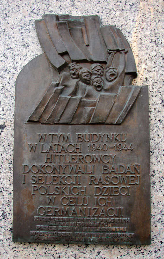 Tablica upamiętniająca dzieci germanizowane przez niemieckich nazistów w Łodzi umiejscowiona na ulicy Piotrkowskiej.